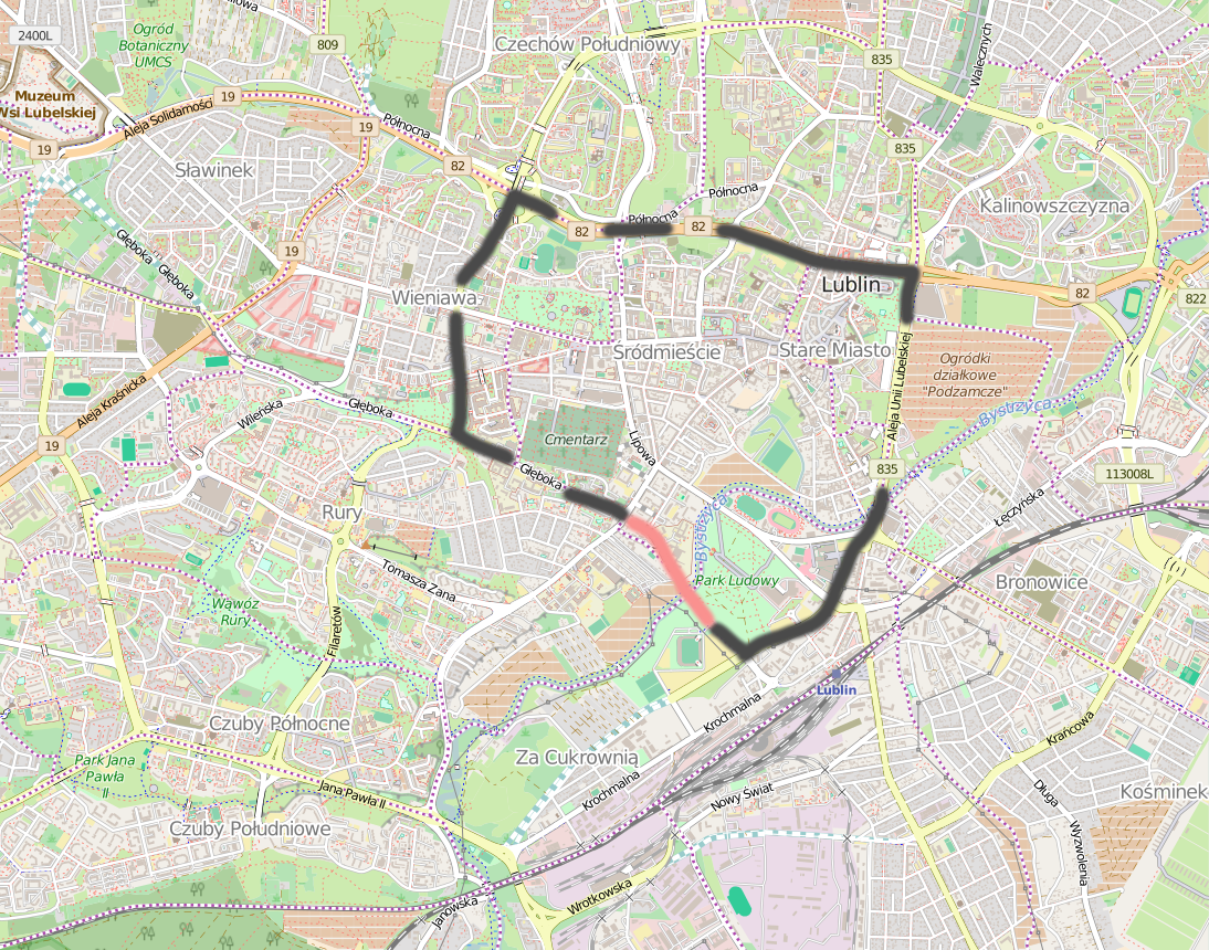 Koncepcja obwodnicy miejskiej Lublina, dane na 2016 r.